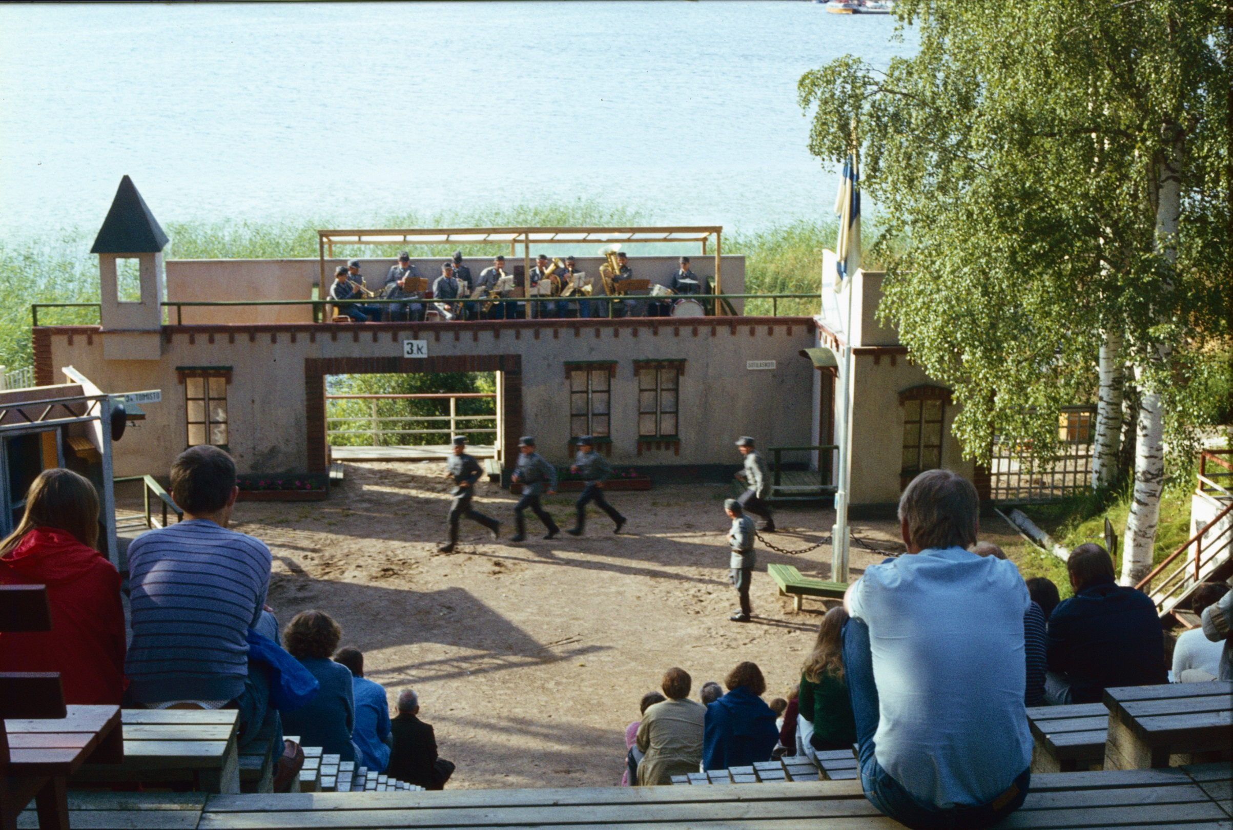 Jyväskylän työväenteatteri Ainolan kesäteatterissa